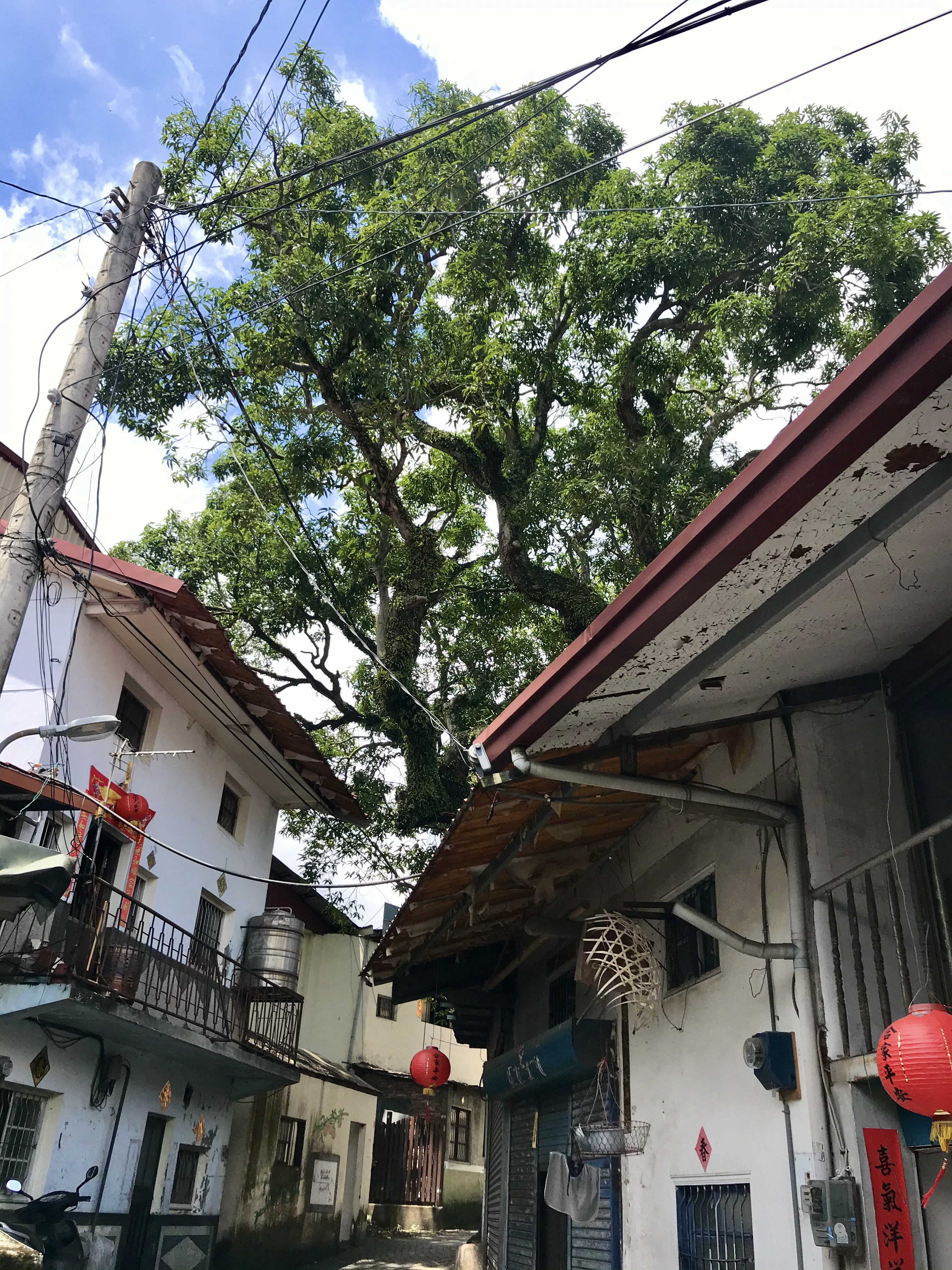 中文（台灣）: 玉峰村芒果神木